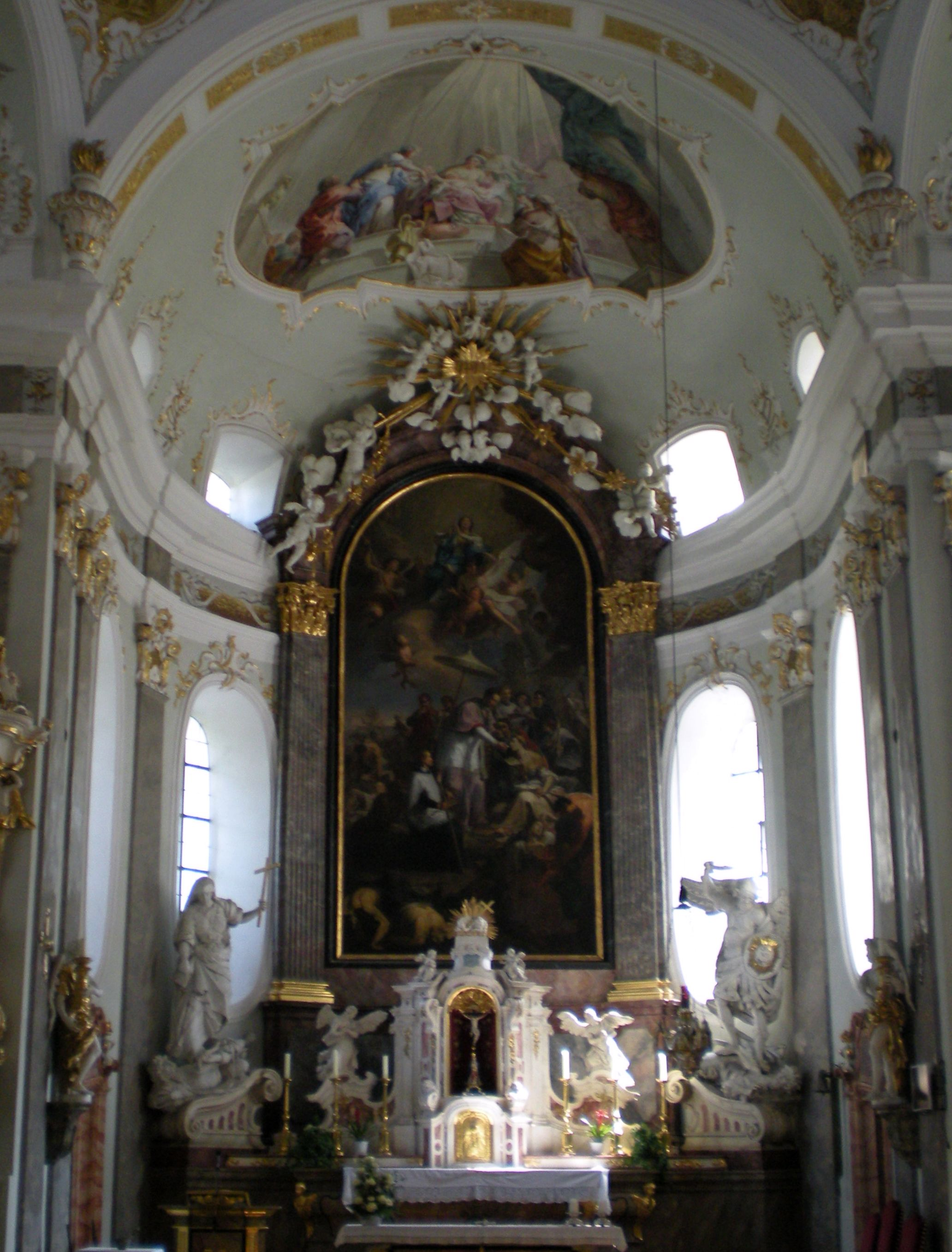 Altar mayor de la iglesia de San Carlos Borromeo, situada en las afueras de Volders (Tirol), muy cerca de Innsbrück.